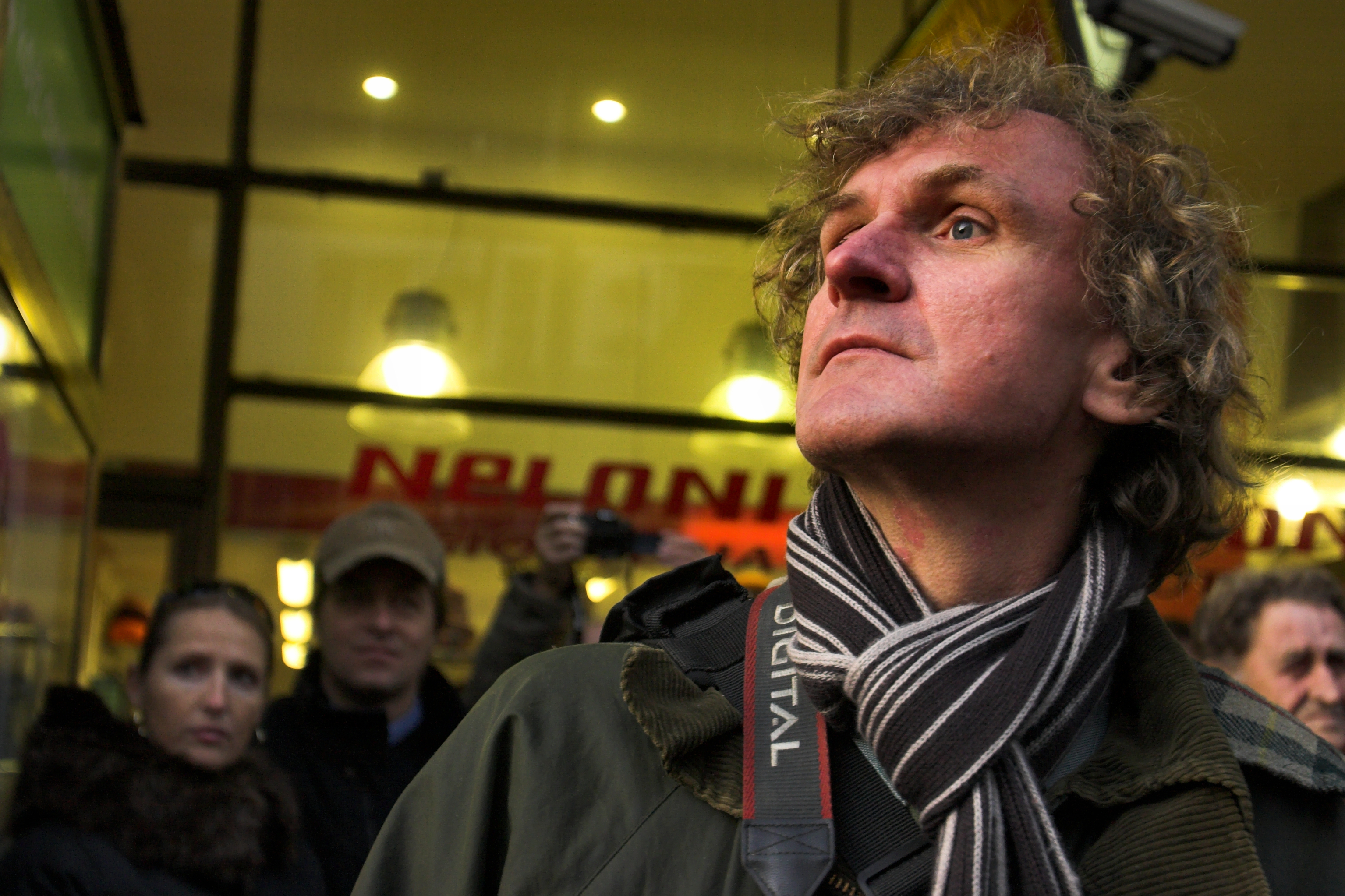 Jan Šibík during demonstration at Národní třída, Prague.